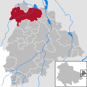 Meuselwitz in Thuringia - District Altenburger Land